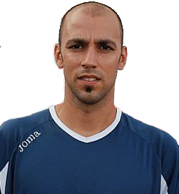 Santi Torres